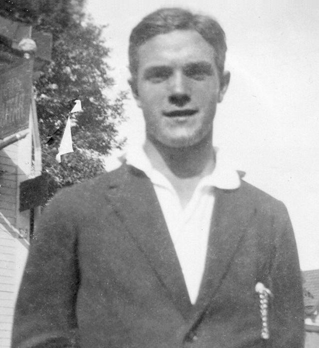 Georg Wener